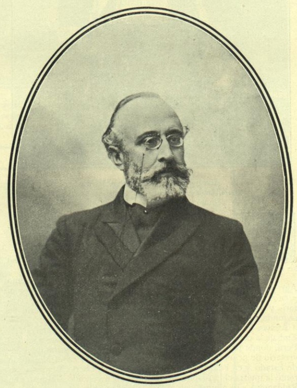 Francisco Silvela, por Christian Franzen.